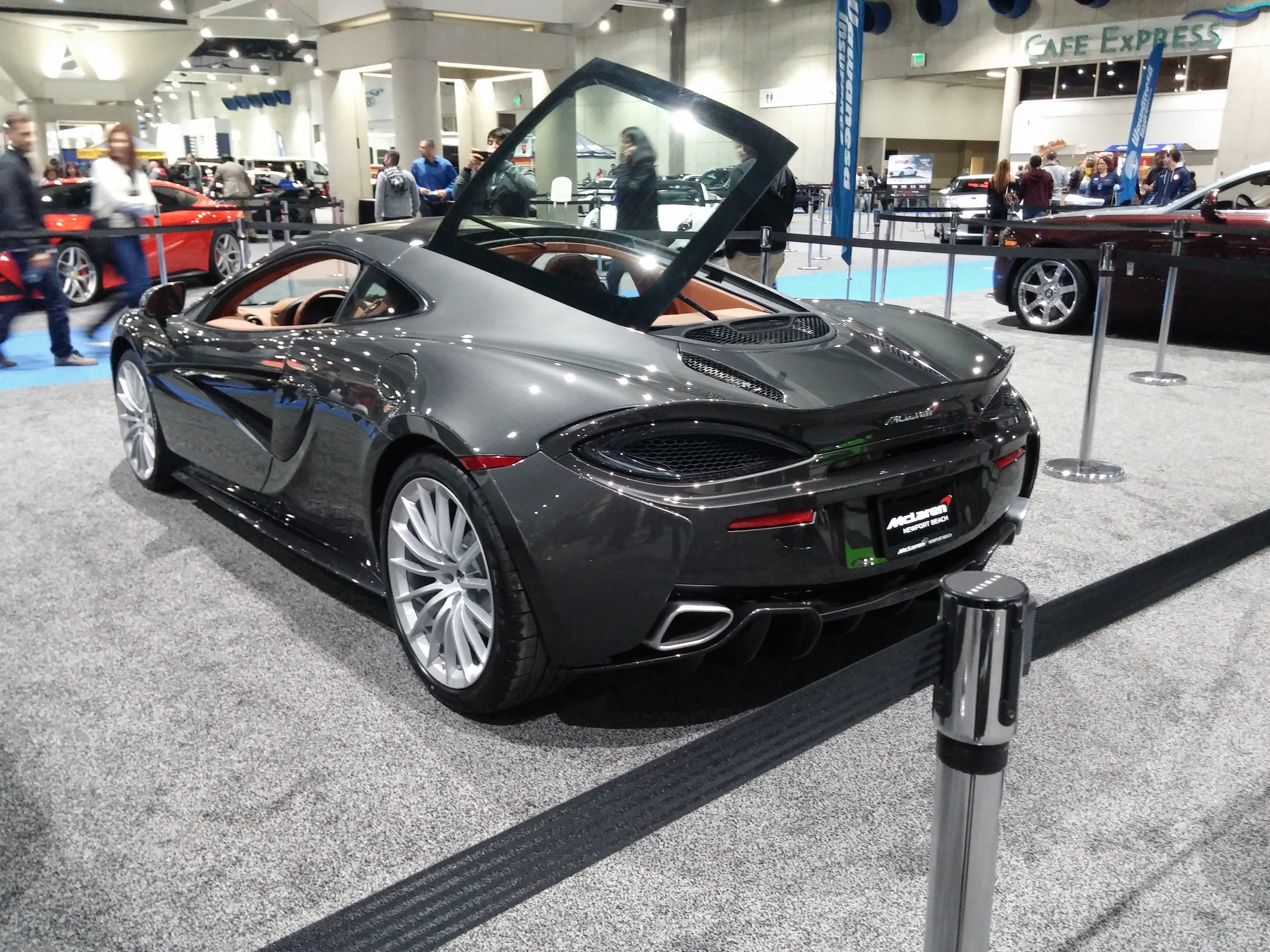 McLaren 570GT Sport Car. Back View